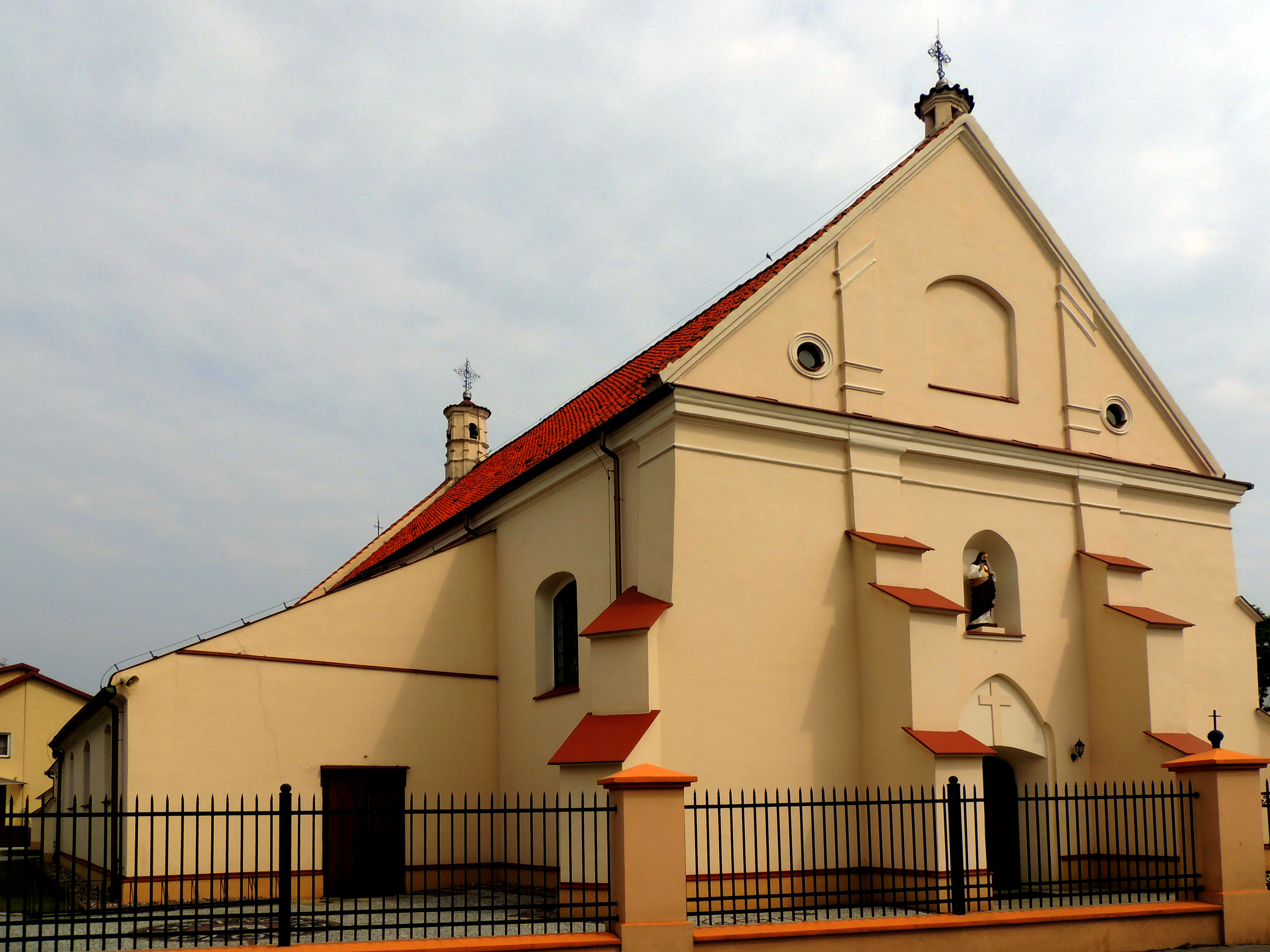 Piątek, kościół par. p.w. Św. Trójcy, 2 poł. XV, 1740